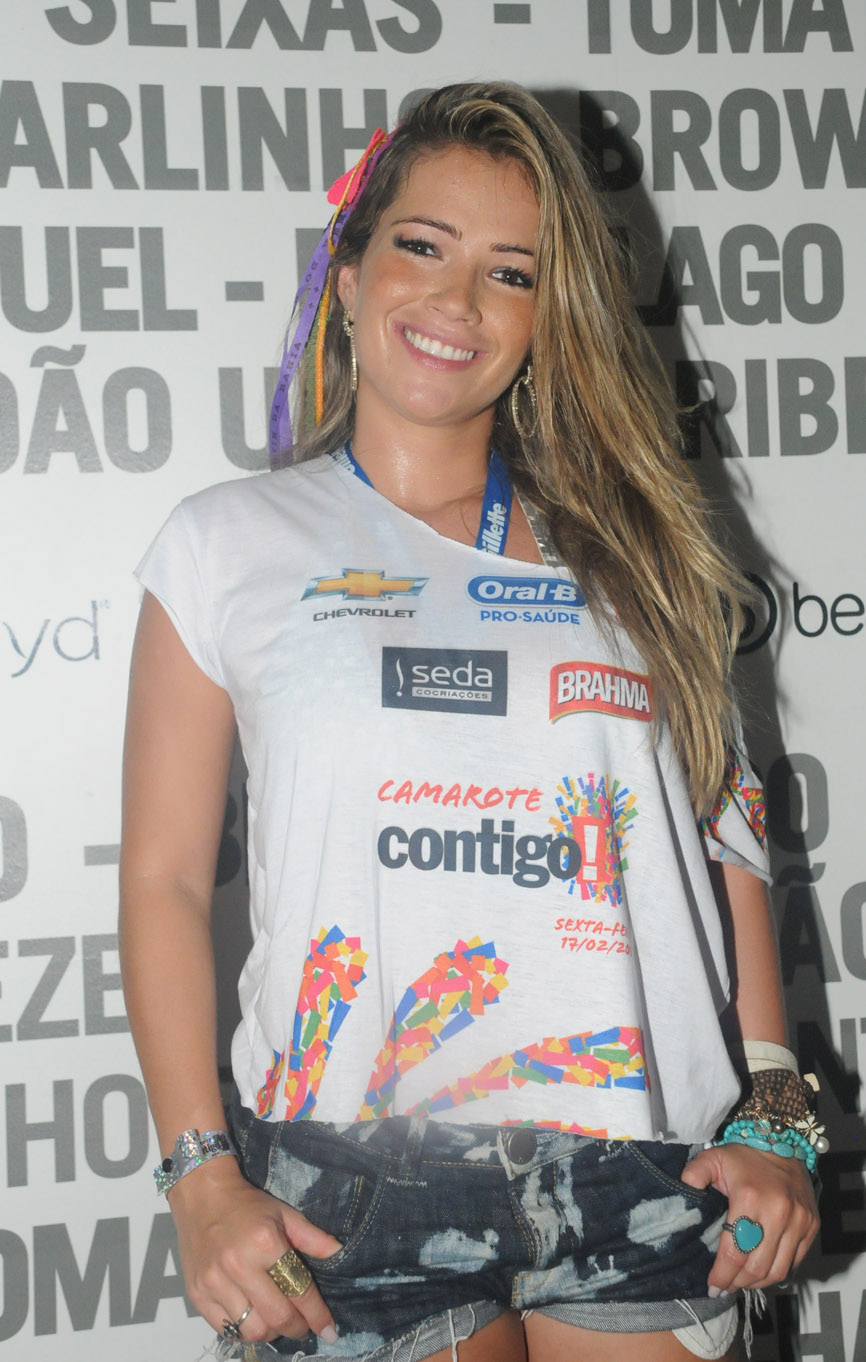 Fani, que participou do Big Brother Brasil 7, no carnaval de 2012.